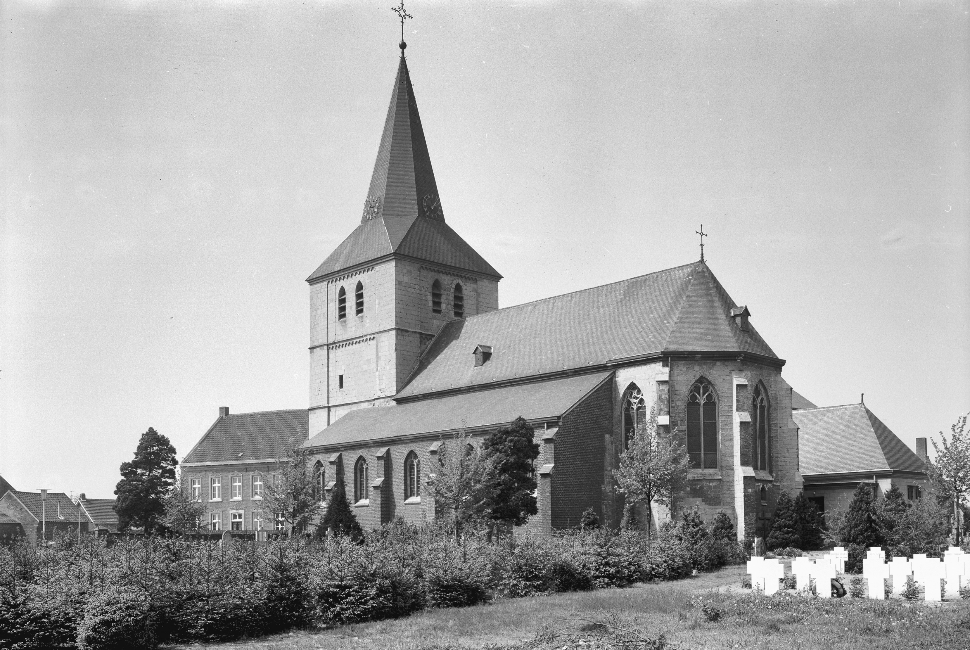 St. Severinuskerk: Overzicht van de kerk